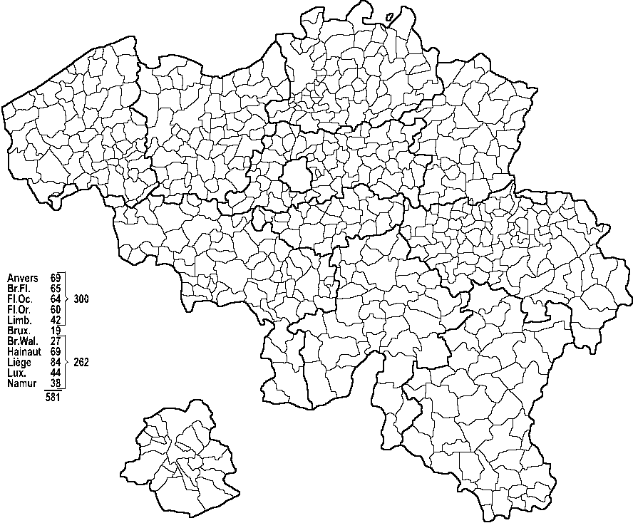 Carte administrative des communes et provinces belges (589 communes - 10 provinces).